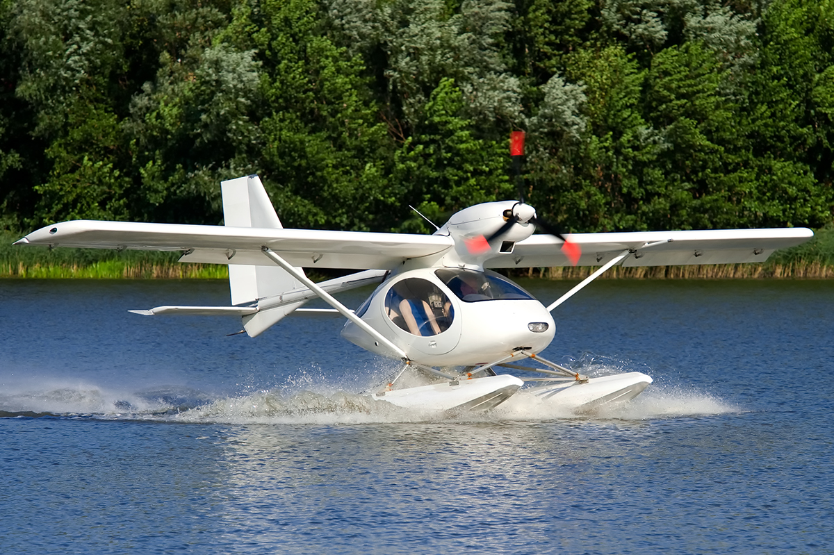 Sigma-4